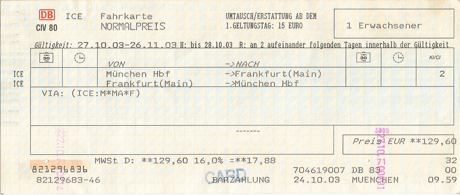 Papierne Fahrkarte Deutsche Bahn für die Fahrten München Hbf ↔ Frankfurt am Main Hbf, 2. Klasse